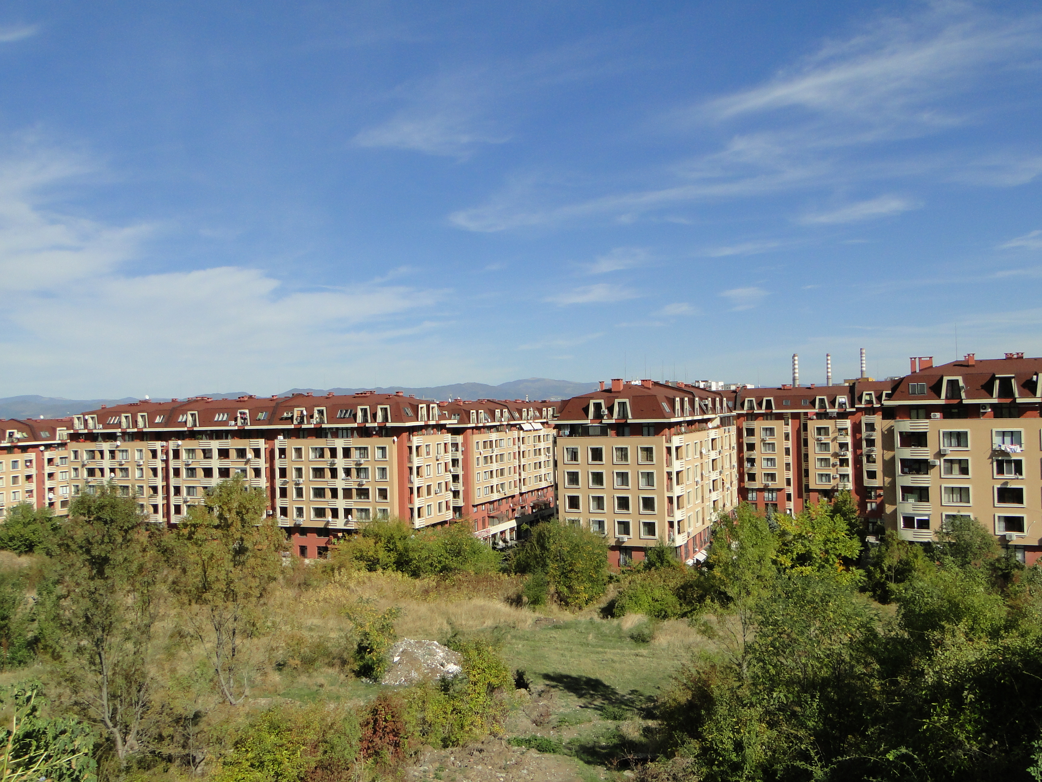 София, 17 октомври 2012 ("Цариградски комплекс" - изглед откъм булеварда)